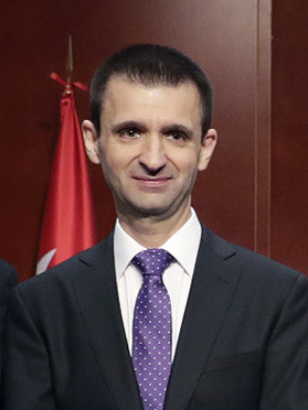 José Pablo López toma posesión como director de Telemadrid